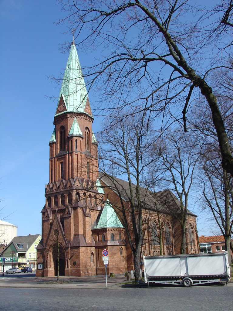 Beschreibung: Matthäuskirche in Lehrte, Architekt: Conrad Wilhelm Hase Quelle: selbst fotografiert, März 2005 Fotograf oder Zeichner: Silberchen 21:33, 13. Apr 2005 (CEST) 18:11, 21. Mär 2005 Silberchen 768 x 1024 (435.667 Byte) (Matthäuskirche in Lehrte)